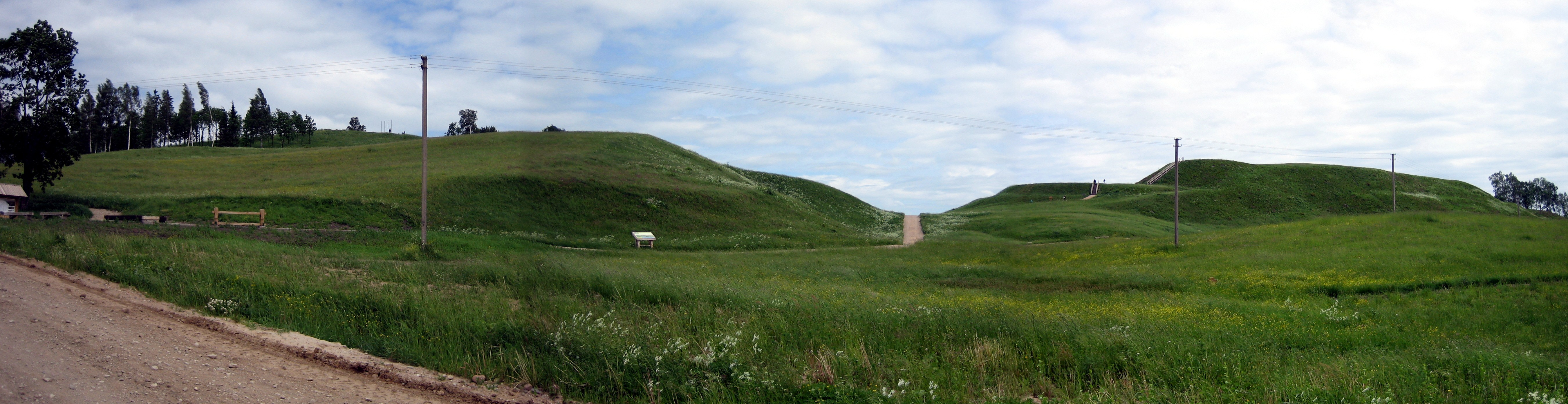 Medvėgalio kalnas ir piliakalnis